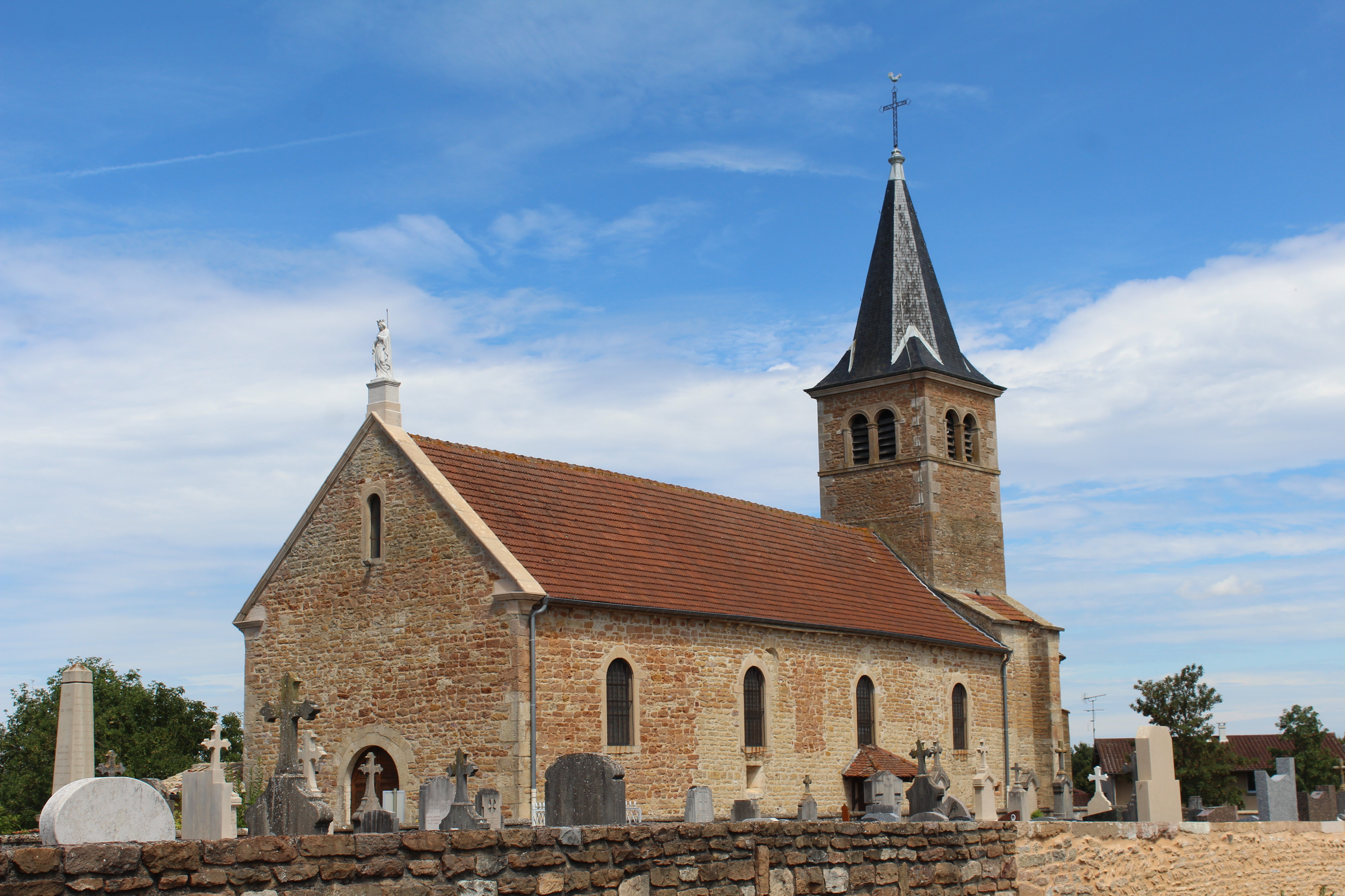 Église de Laiz.